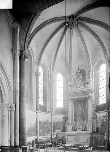 Vue intérieure du choeur.